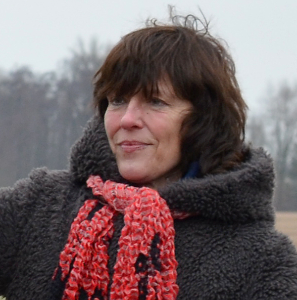 Karola Hagemann bei der Enthüllung einer Infotafel in Wilkenburg am Römischen Marschlager Wilkenburg